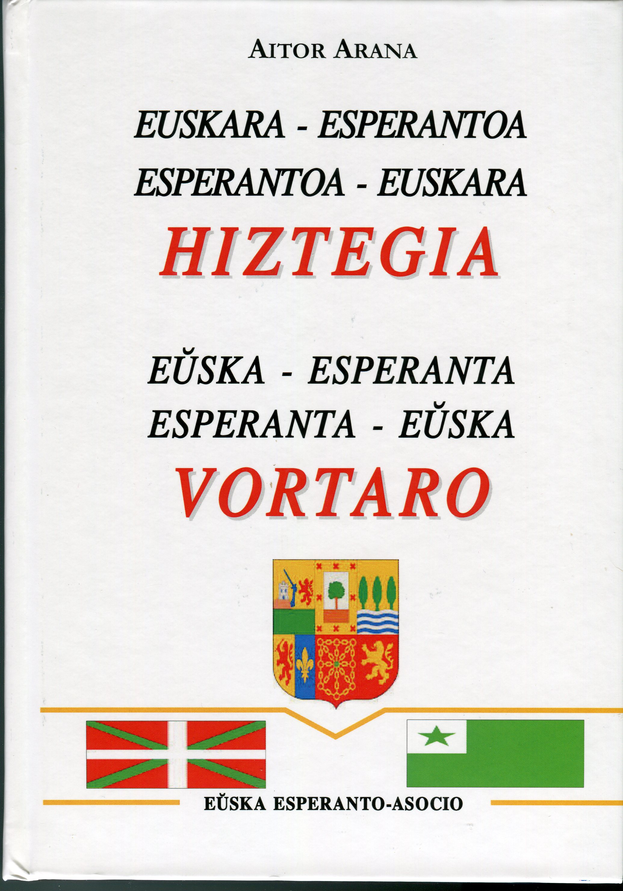 Euskara-esperantoa Esperantoa-euskara hiztegia, Eŭska-esperanta Esperanta-eŭska vortaro, Aitor Arana, Eŭska Esperanto-Asocio, 2015